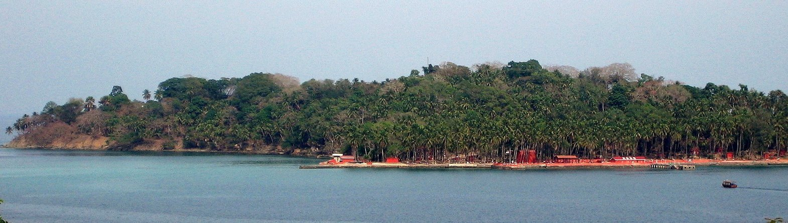 ആൻഡമാനിലെ ബ്രിട്ടീഷ് ആസ്ഥാനമായിരുന്ന റോസ് ദ്വീപ്; സെല്ലുലാർ ജയിലിന്റെ മുകളിൽ നിന്നുള്ള കാഴ്ച.